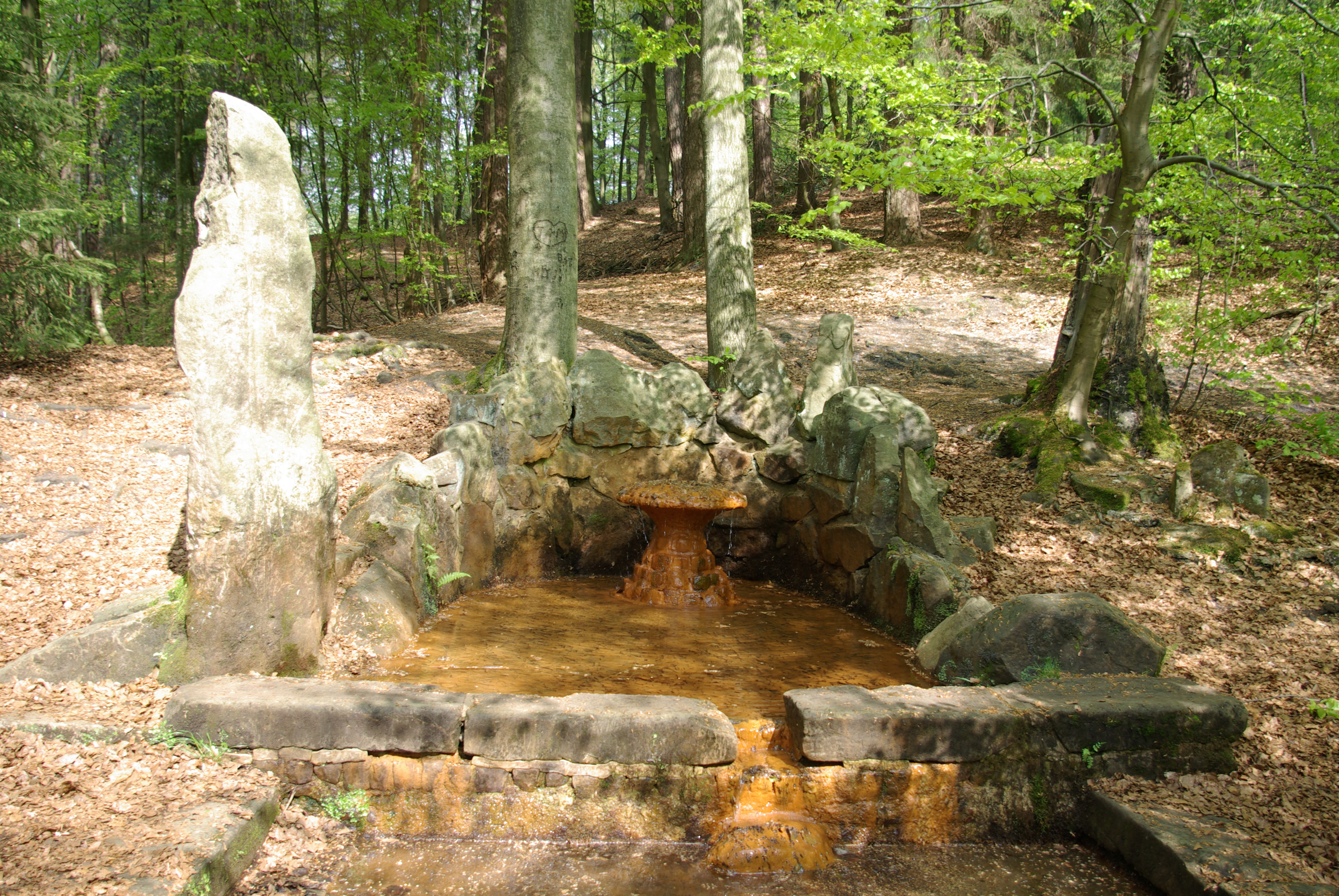 Gefasste, eisenhaltige Quelle am Hasselbach (Werre), unterhalb des Donoperteiches